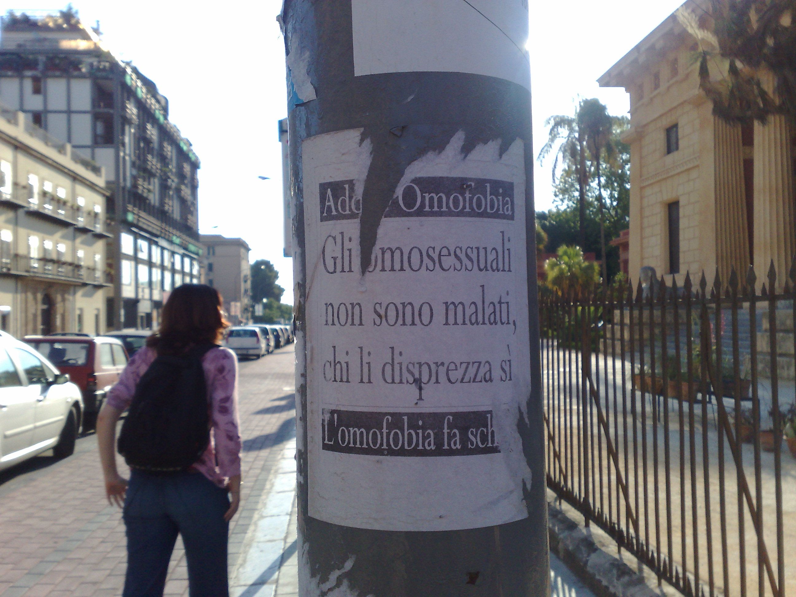 Stop all'omofobia. Palermo, 2008